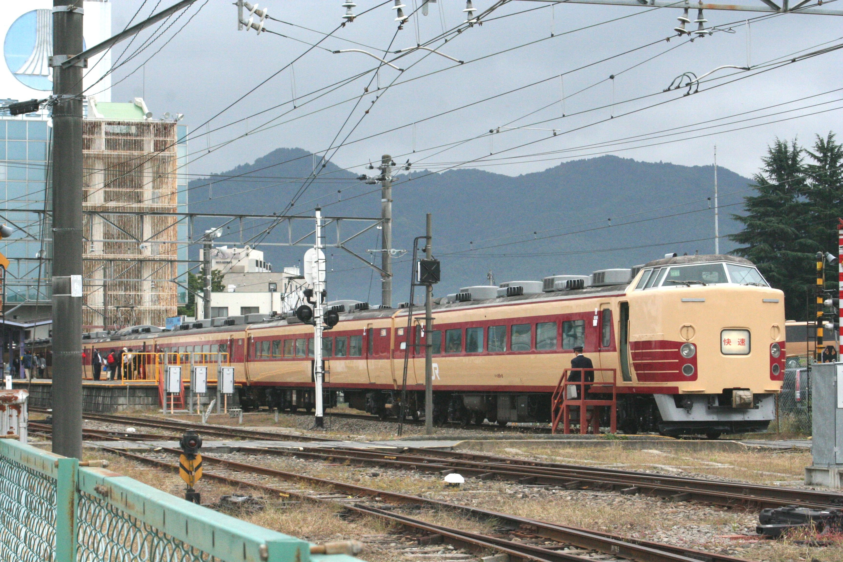 ホリデー快速河口湖 JR東日本 183系 田町車両センターH61編成